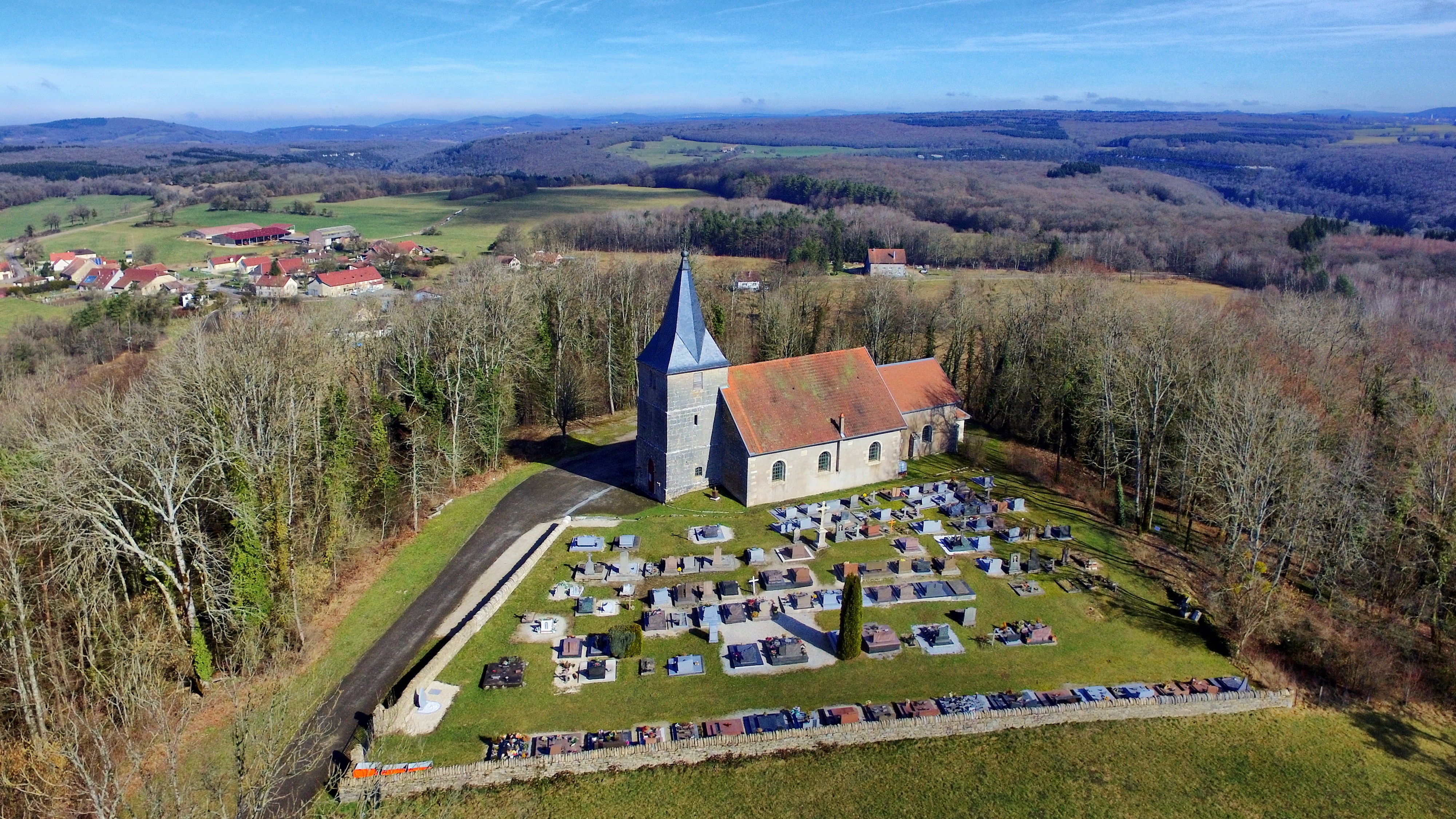 Eglise de Mont-sur-Lison